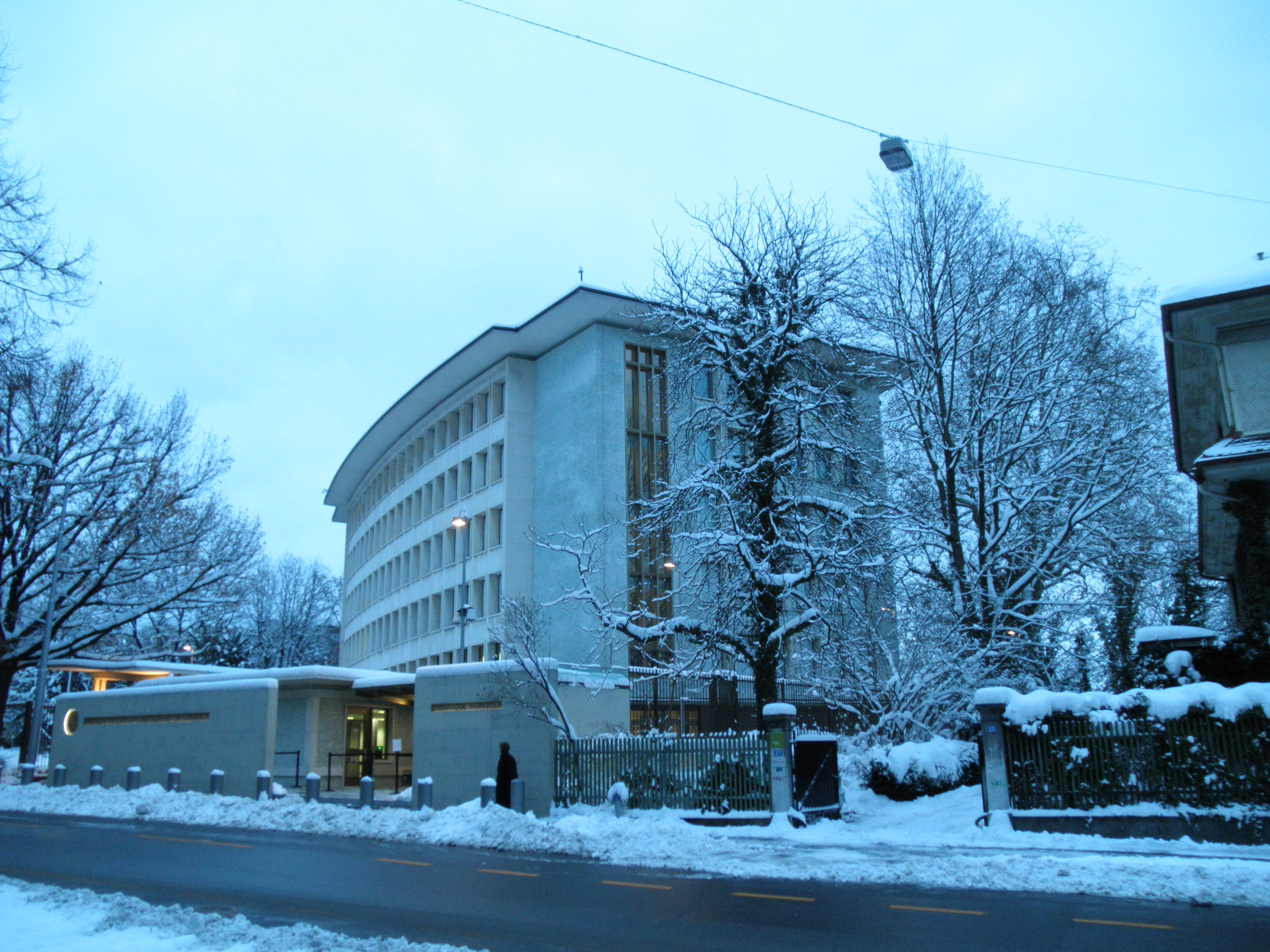 Bern, Botschaft der USA im Monbijou